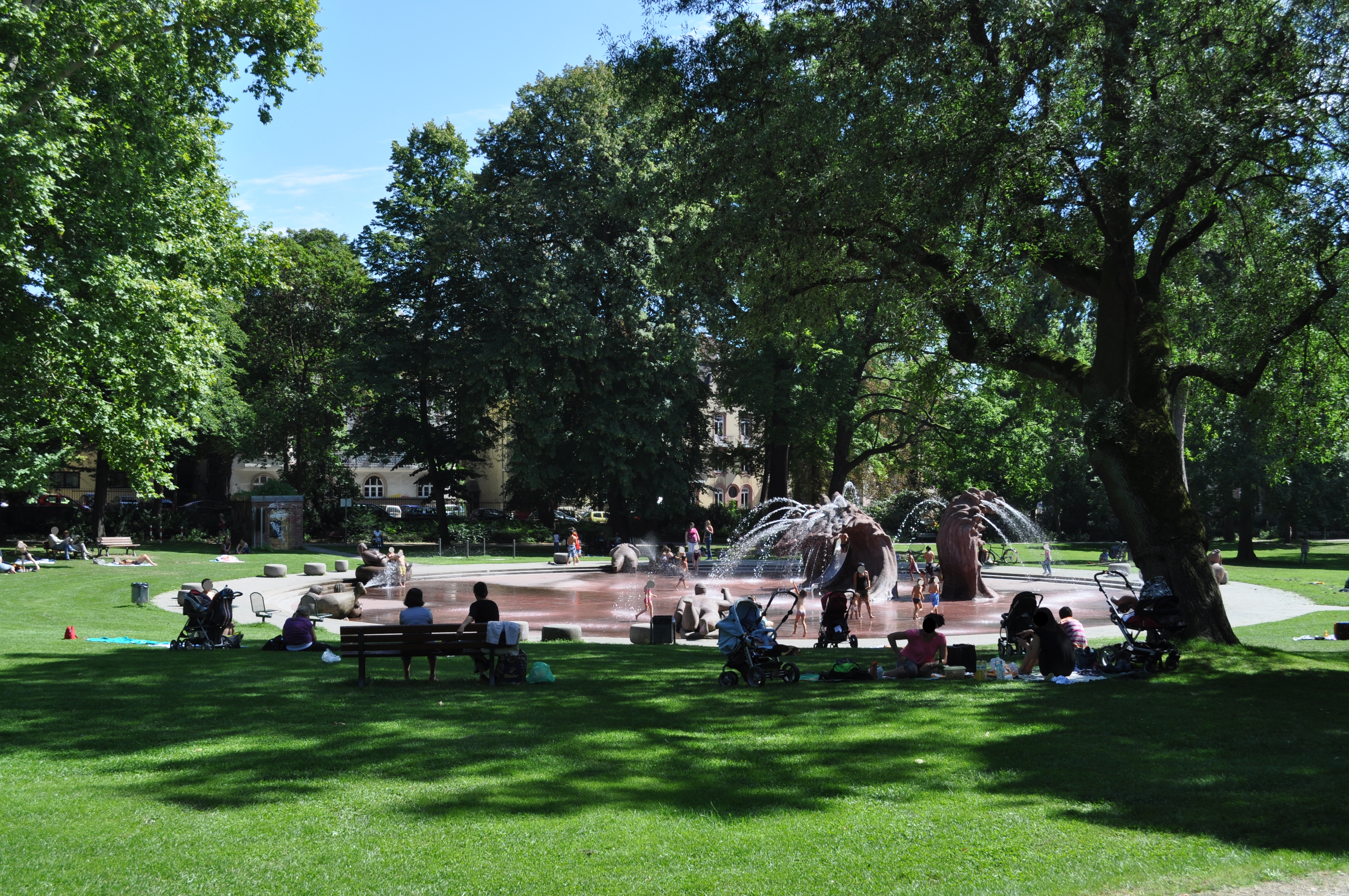 Wasserspiele im Günthersburgpark in Frankfurt am Main